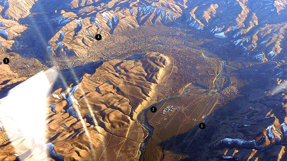 = Luftbild von Faizabad, Flugrichtung Süden 1. Feyzabad International Airport 2. Camp Feyzabad 3. Feyzabad Altstadt 4. Feyzabad neuer Bezirk